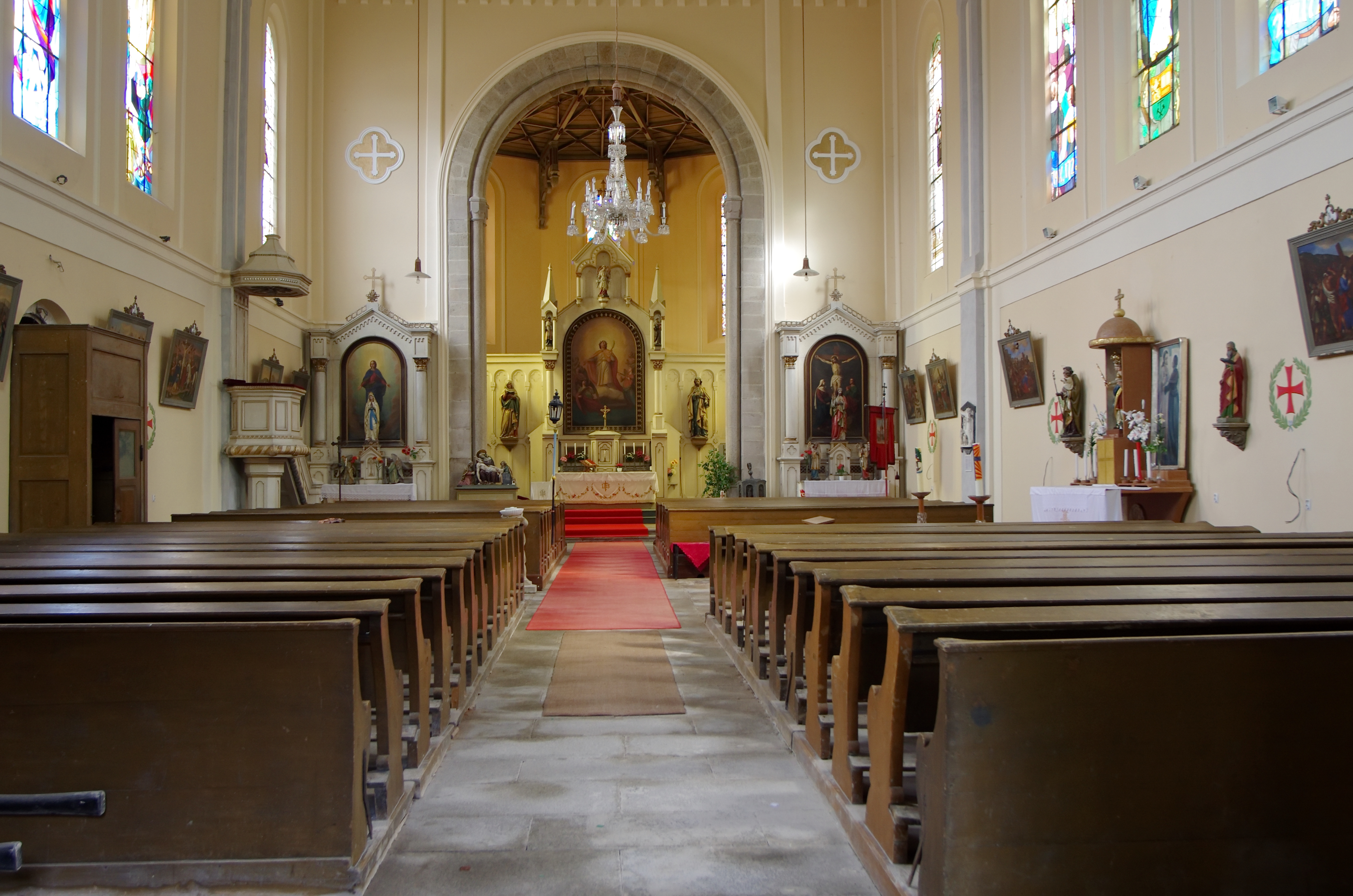 Krásno, interiér kostela sv. Kateřiny, okres Sokolov